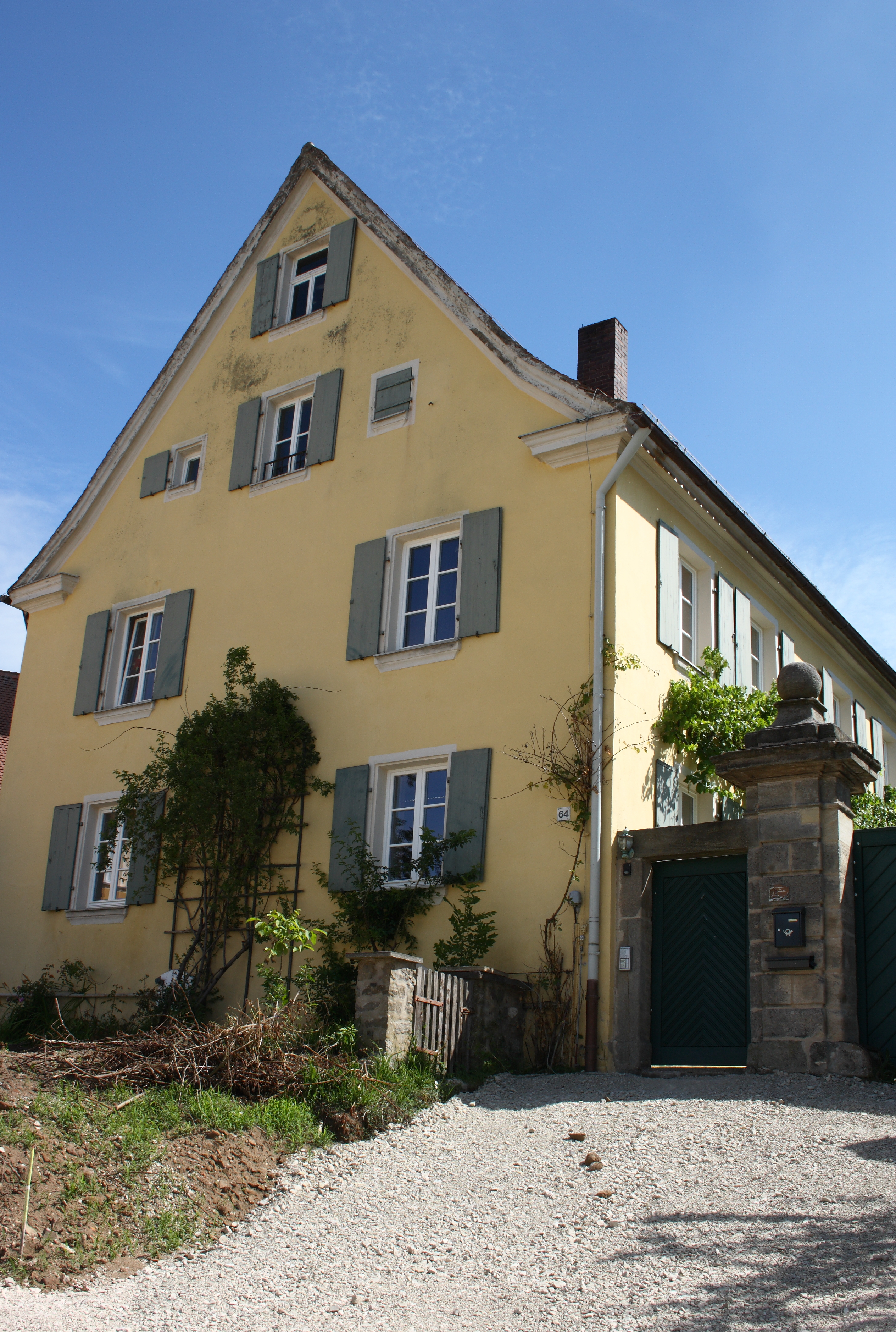 Ehemaliges Pfarrhaus in Geilsheim, einem Stadtteil von Wassertrüdingen im Landkreis Ansbach (Bayern/Mittelfranken), Geilsheim 64, zweigeschossiger Putzbau mit Steildach, 18. Jahrhundert